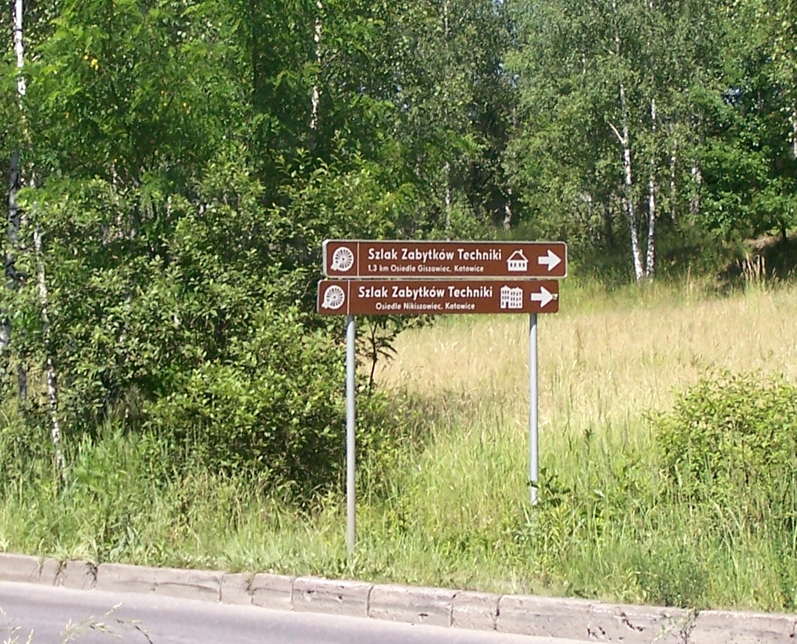 Tablice informacyjne Szlaku Zabytków Techniki przed osiedlem Giszowiec.